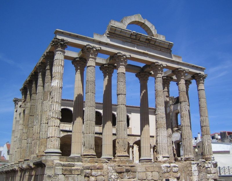 Le Temple de Diane à Mérida, Province de Badajoz (Espagne)